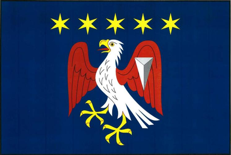 vlajka, Krahulčí, okres Jihlava